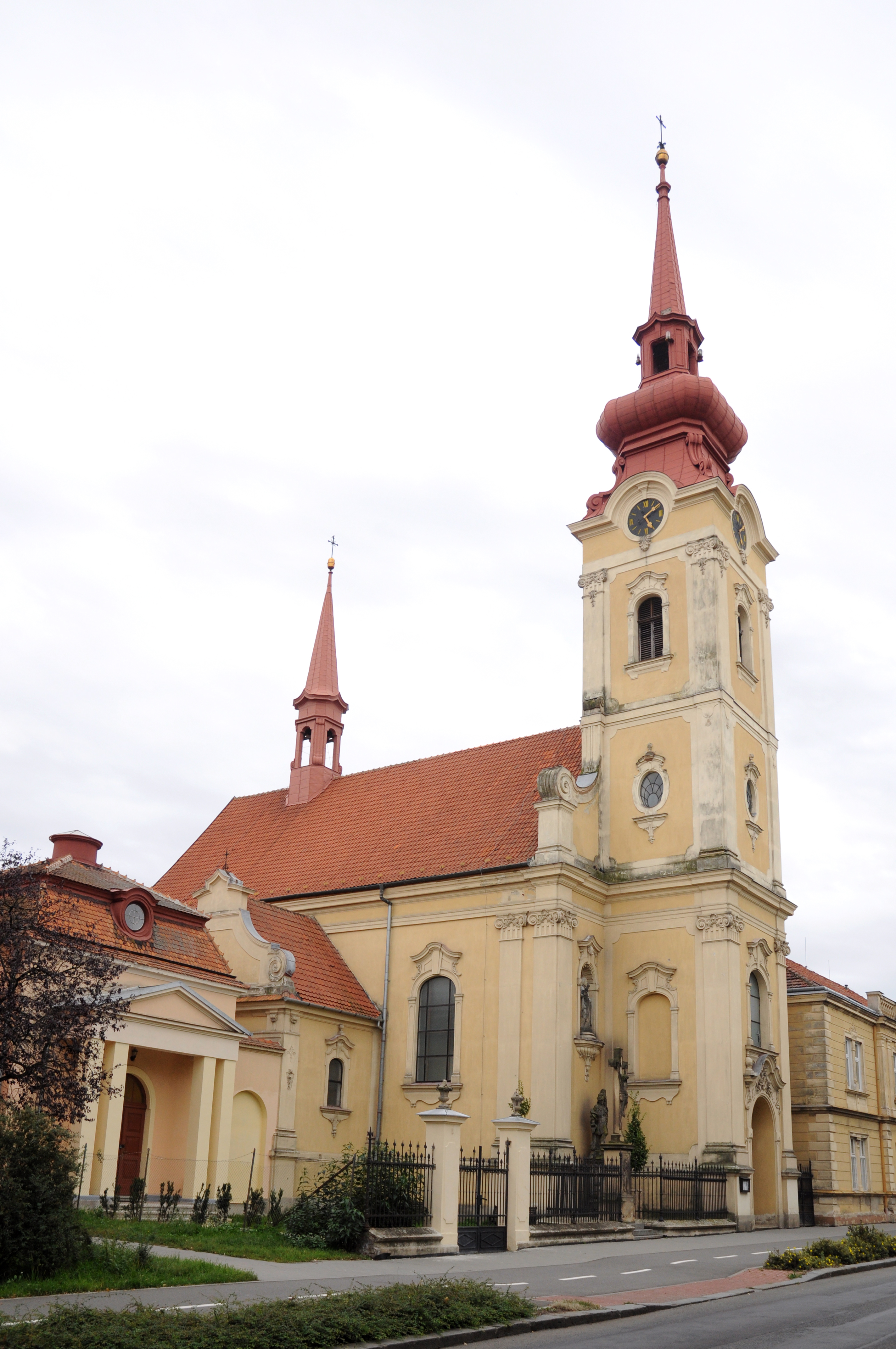 Kostel sv. Cyrila a Metoděje (Prostějov), Brněnská, Prostějov